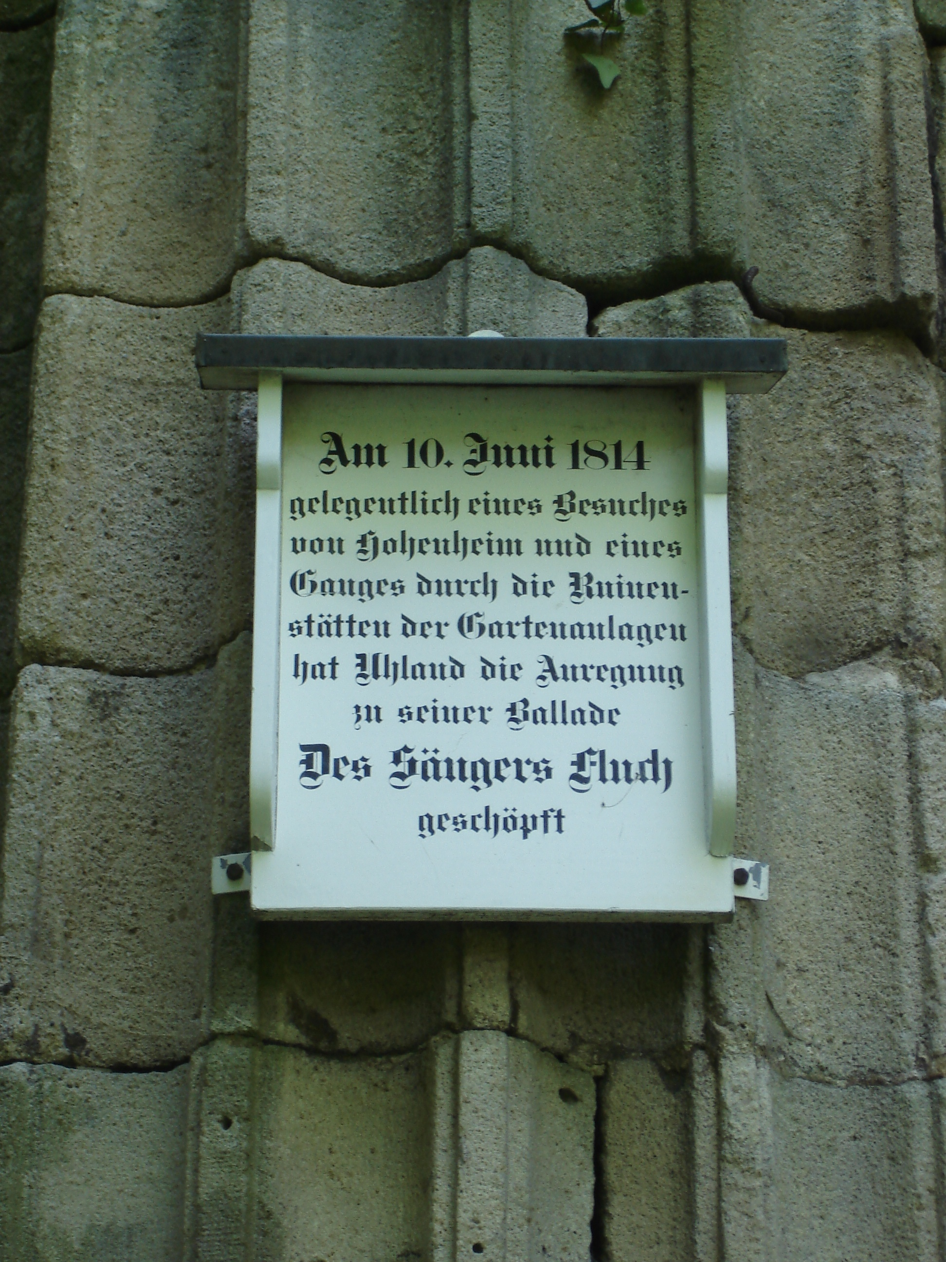 Gedenktafel für Ludwig Uhland an der Jupitersäule im Schlosspark Hohenheim. Am 10. Juni 1814 gelegentlich eines Besuches von Hohenheim und eines Ganges durch die Ruinenstätten der Gartenanlagen hat Uhland die Anregung zu seiner Ballade Des Sängers Fluch geschöpft.